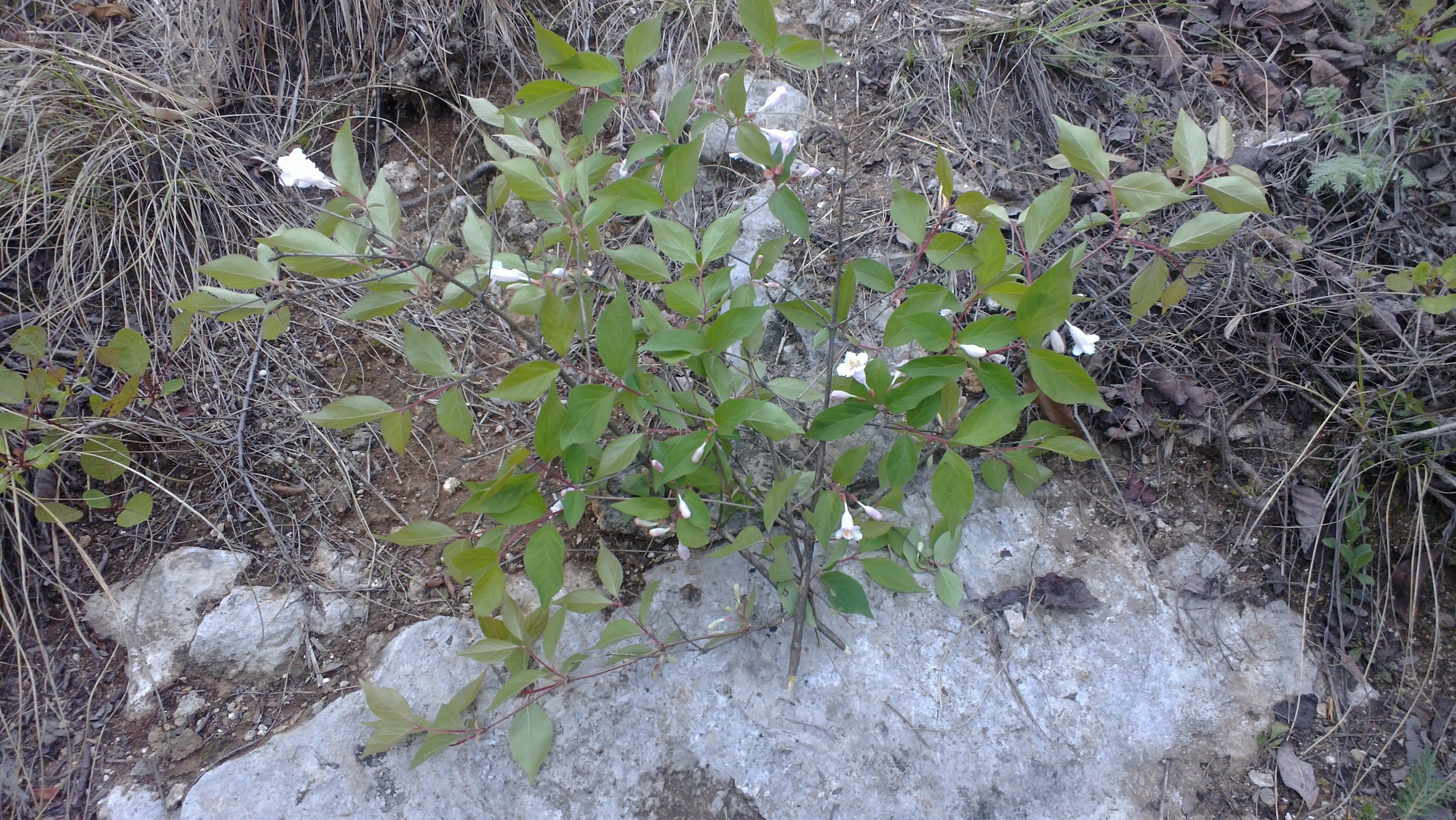 中文（台灣）: 被殲滅者陣亡了，殲滅者亦在翌年陣亡了，中華民國與日本兩國青年英才皆亡於戰事，而今只期望和平、民主普照東亞諸邦。73年後，中國大陸人士給陣亡者獻花，祈求人類和平！